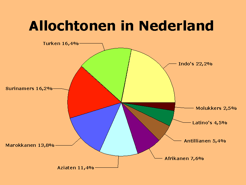 Dit diagram geeft de verdeling van het aantal allochtonen in Nederland weer.